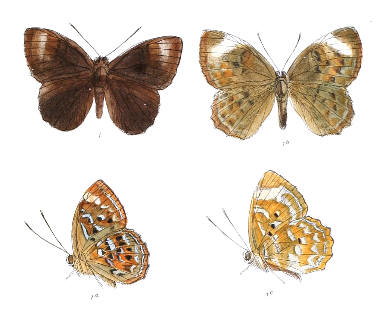 Taxila fasciata